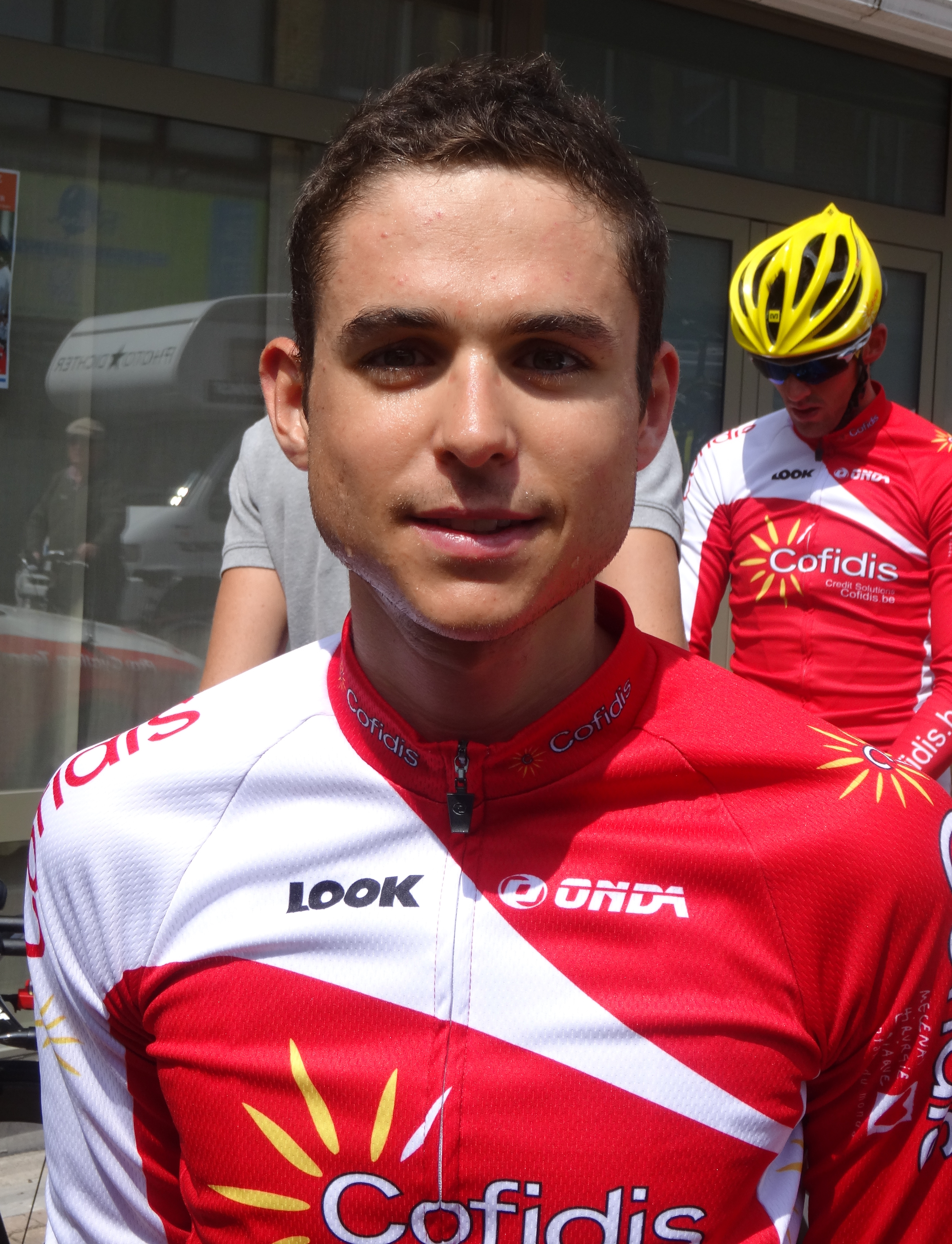 Reportage photographique réalisé le vendredi 30 mai à l'occasion du contre-la-montre individuel de la troisième étape du Tour de Belgique 2014 à Dixmude, Belgique.